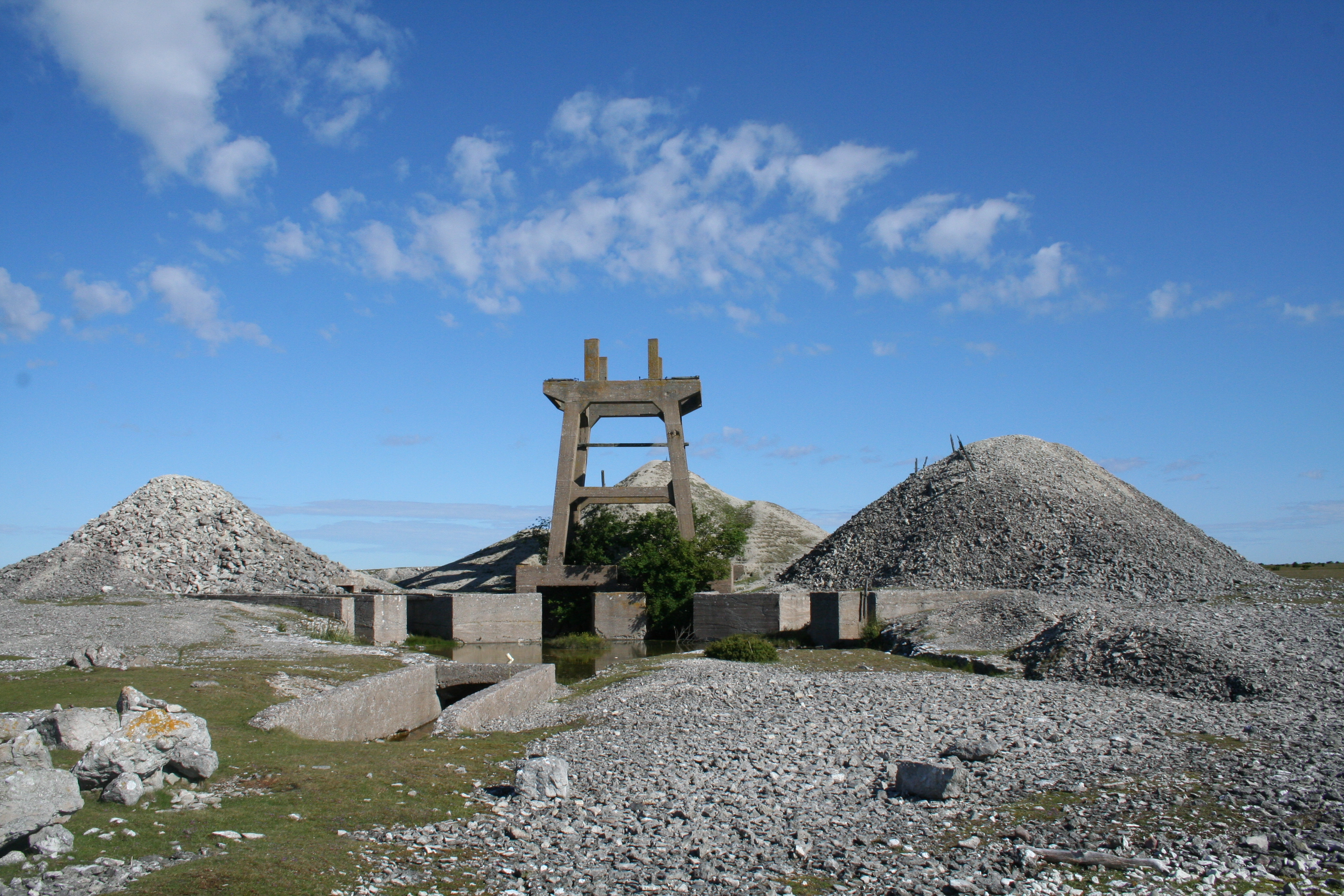 Industrilämning på Norsholmen, Fårö, Gotland